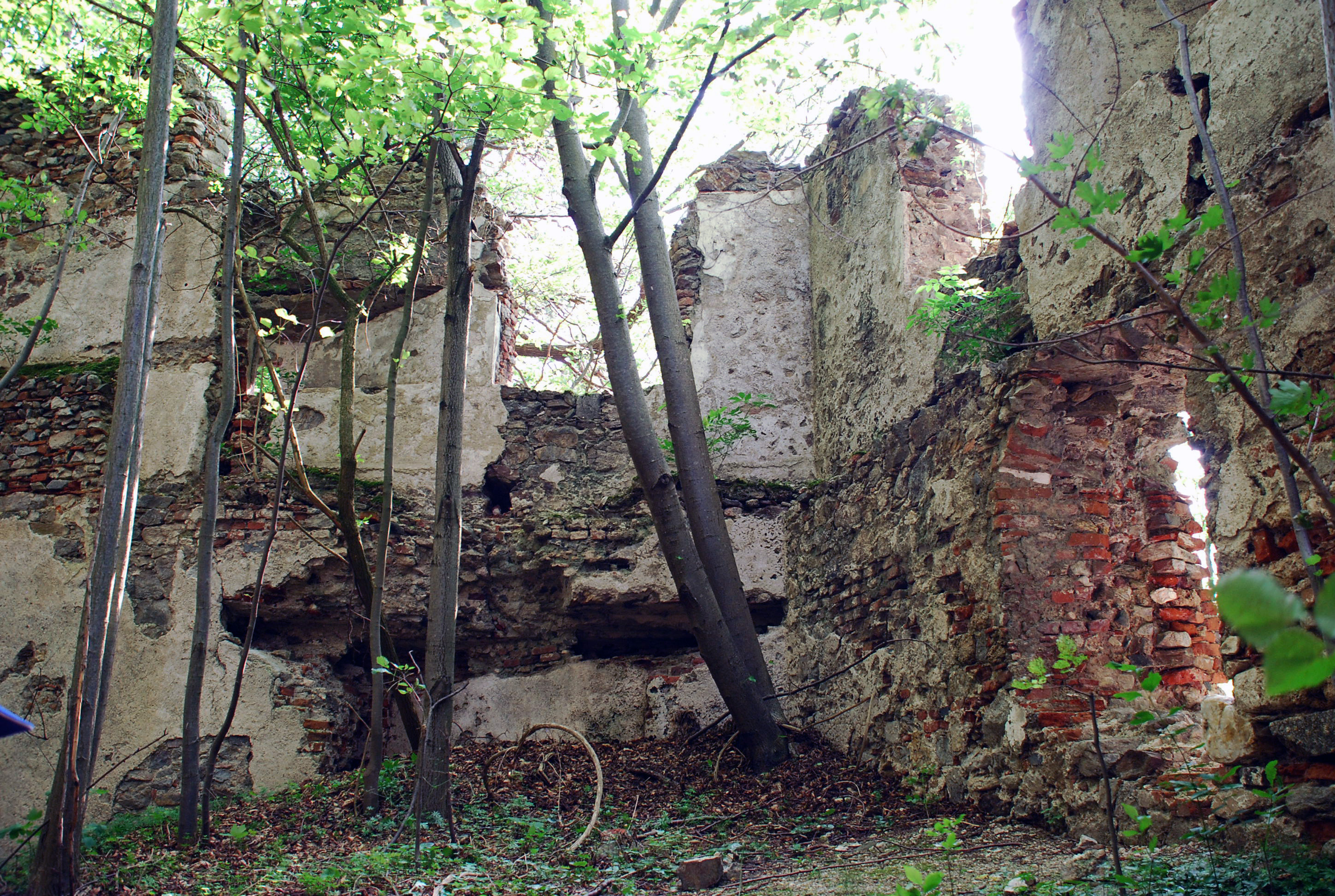 Burgruine Schwarzenbach, Niederösterreich: Innenhof